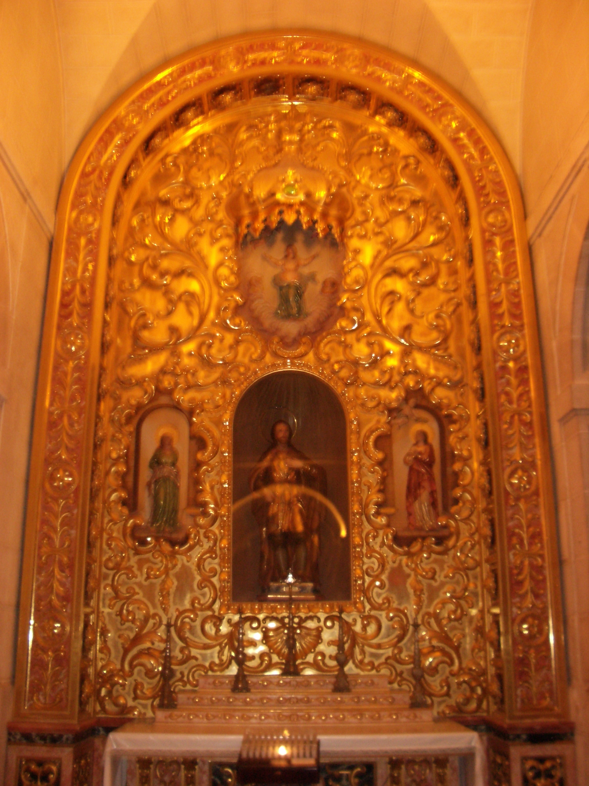 Altar de San Agatángelo en la Basílica de Santa María de Elche